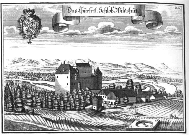 Schloss Wildshut